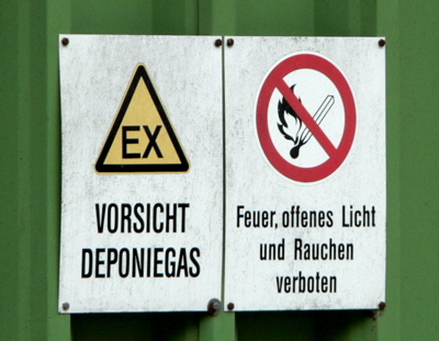 Warnschilder auf der Deponie Gutenfurt